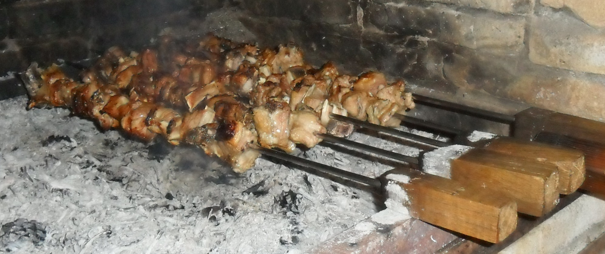 Lechazo al pincho preparado. S de V.